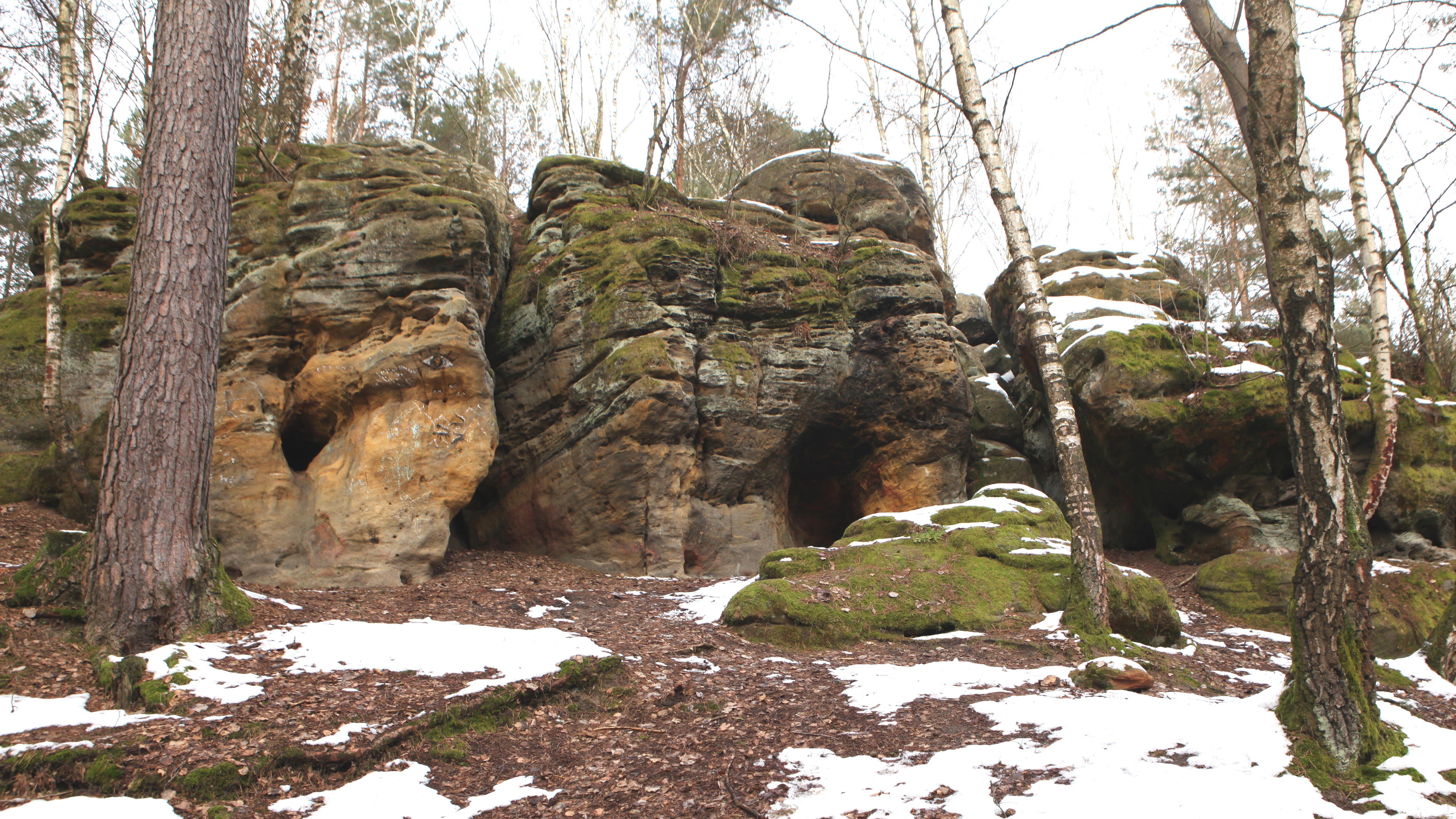 Blumenrod, Sauloch